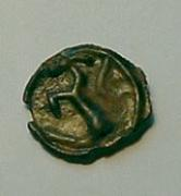 Potin à la grosse tête, monnaie trouvée dans un champ sur la commune d'Étrelles-et-la-Montbleuse (Haute-Saône, France).